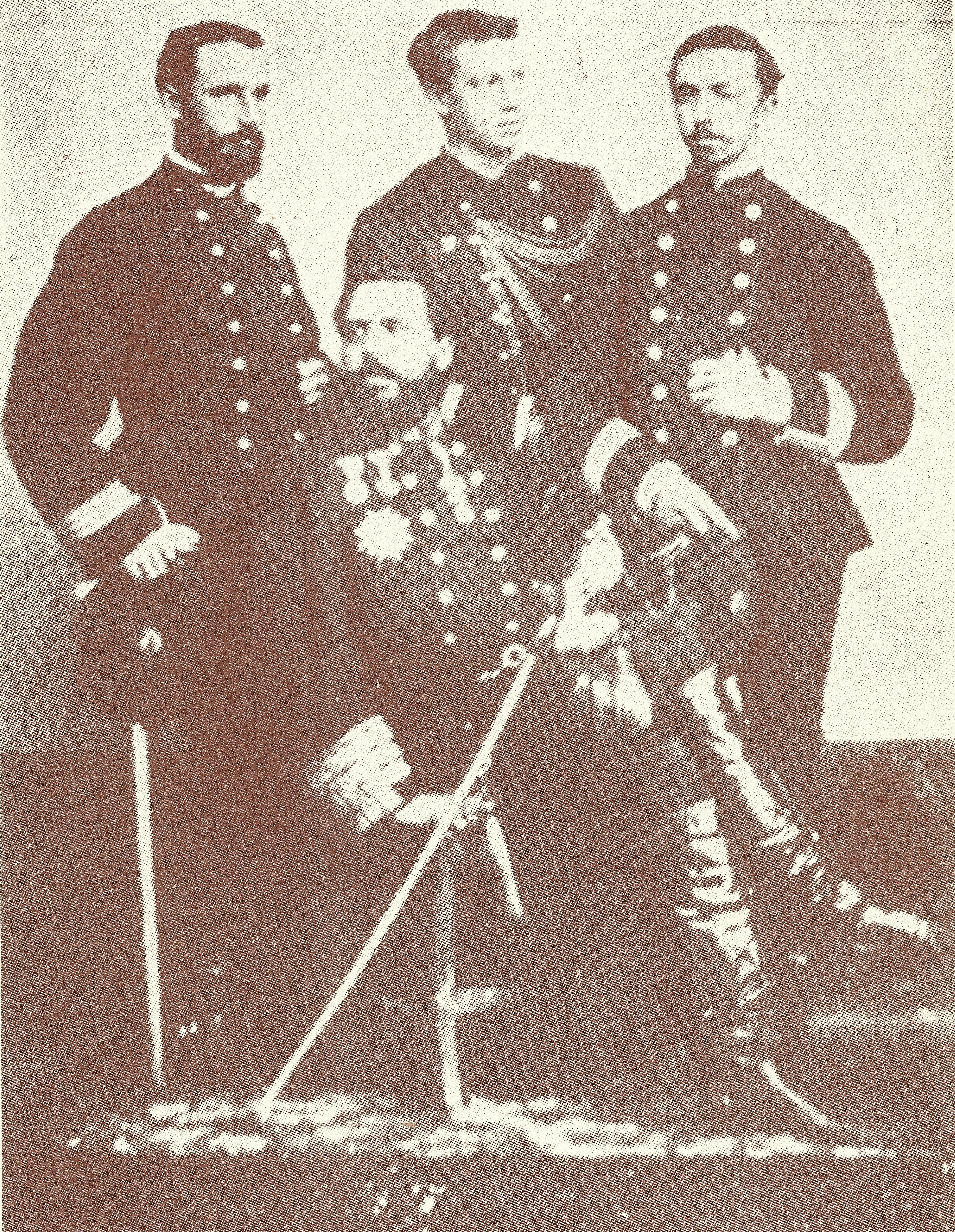 Los Borbones italianos en la guerra carlista de 1874 De pie, de izquierda a derecha: S.A.R. Alfonso de Borbón-Dos Sicilias y Austria, conde de Caserta. S.A.R. Enrique de Borbón-Parma, Conde de Bardi; S.A.R. el duque Roberto I de Parma; Sentado: Su Majestad Católica el Rey Carlos VII.